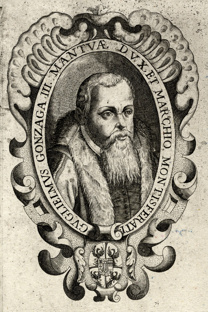 Portrait aus einer Serie von Gonzaga-Portraits, Kupferstich, 17. Jh.; Guglielmo III.